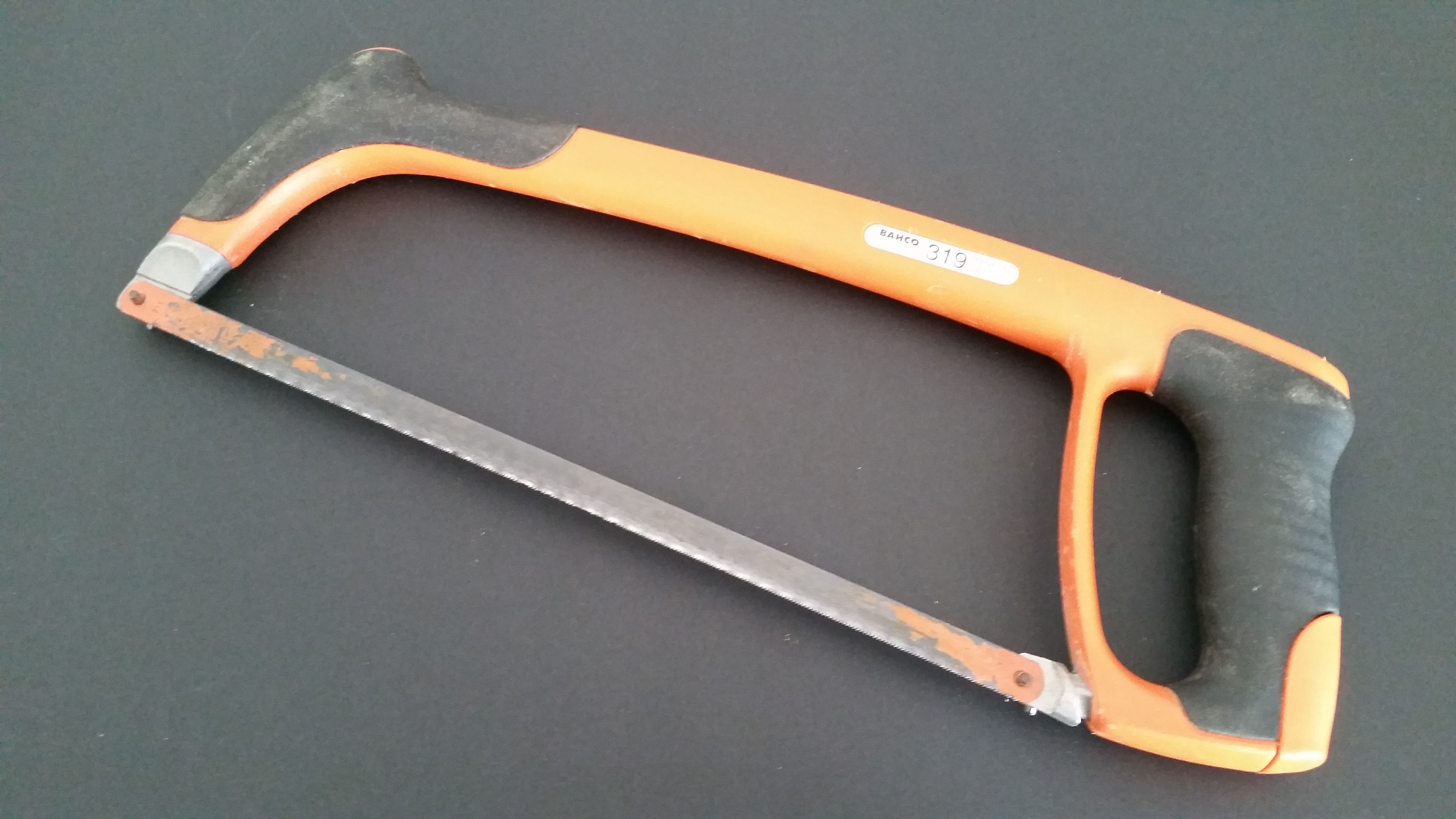 Serra manual